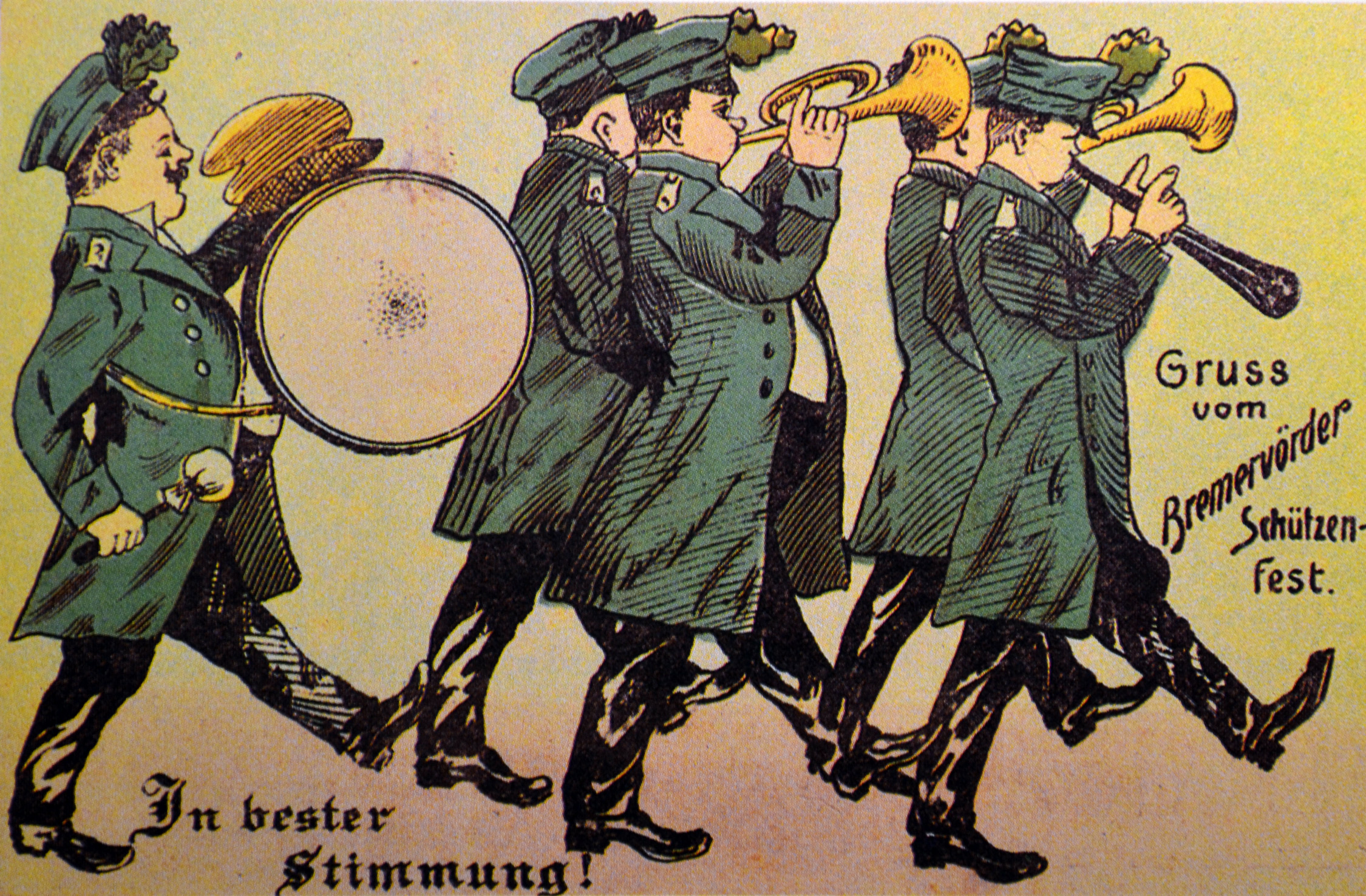 Ansichtskarte der Bremervörder Schützengesellschaft, Jahr unbekannt.